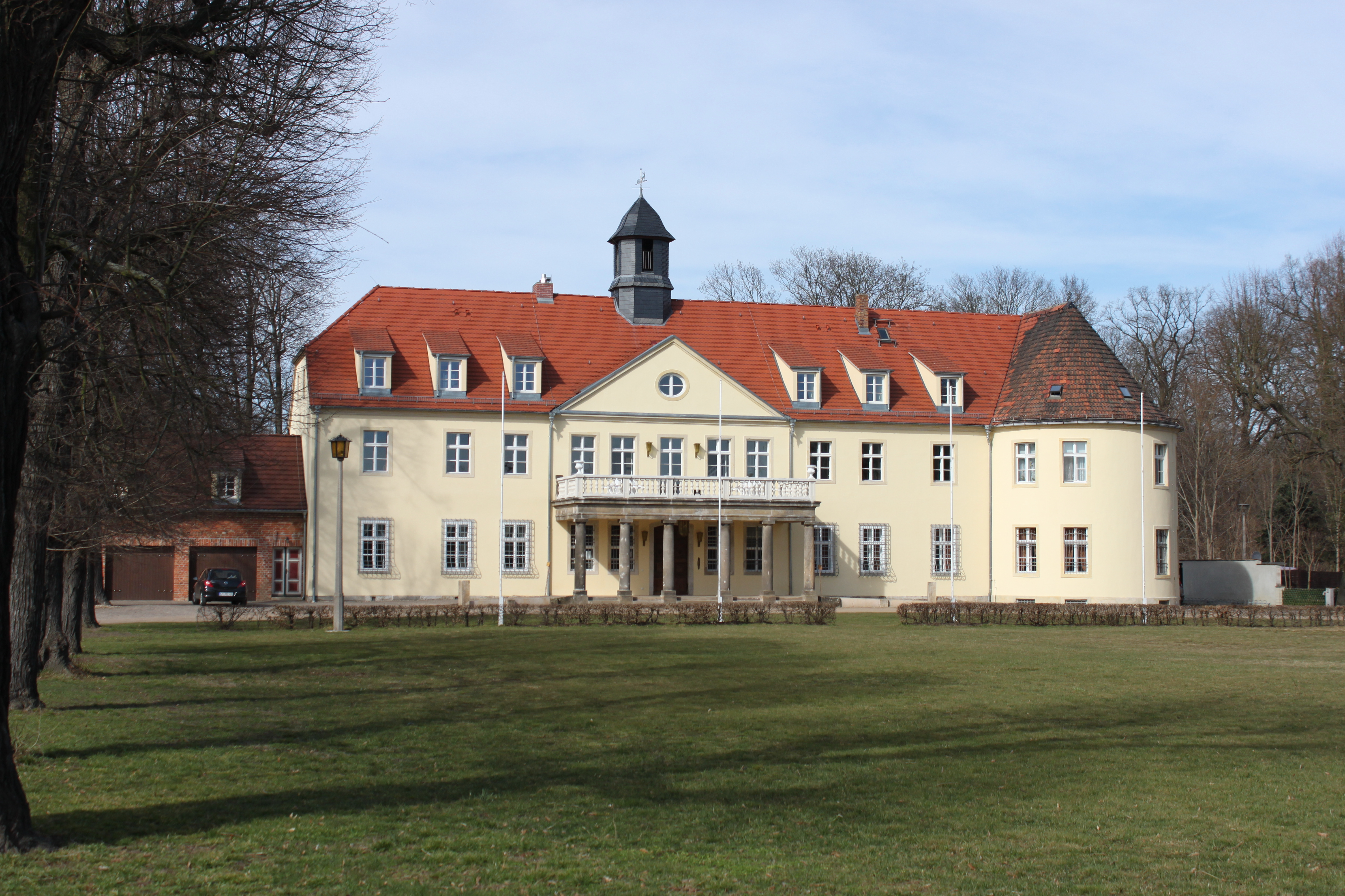 Grochwitz bei Herzberg/Elster, Schloßgelände.